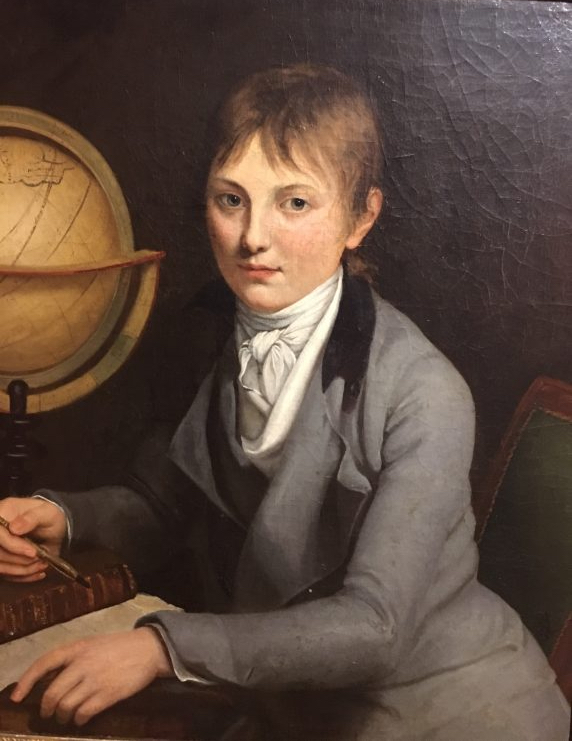 Charles Greffulhe as a young geograph